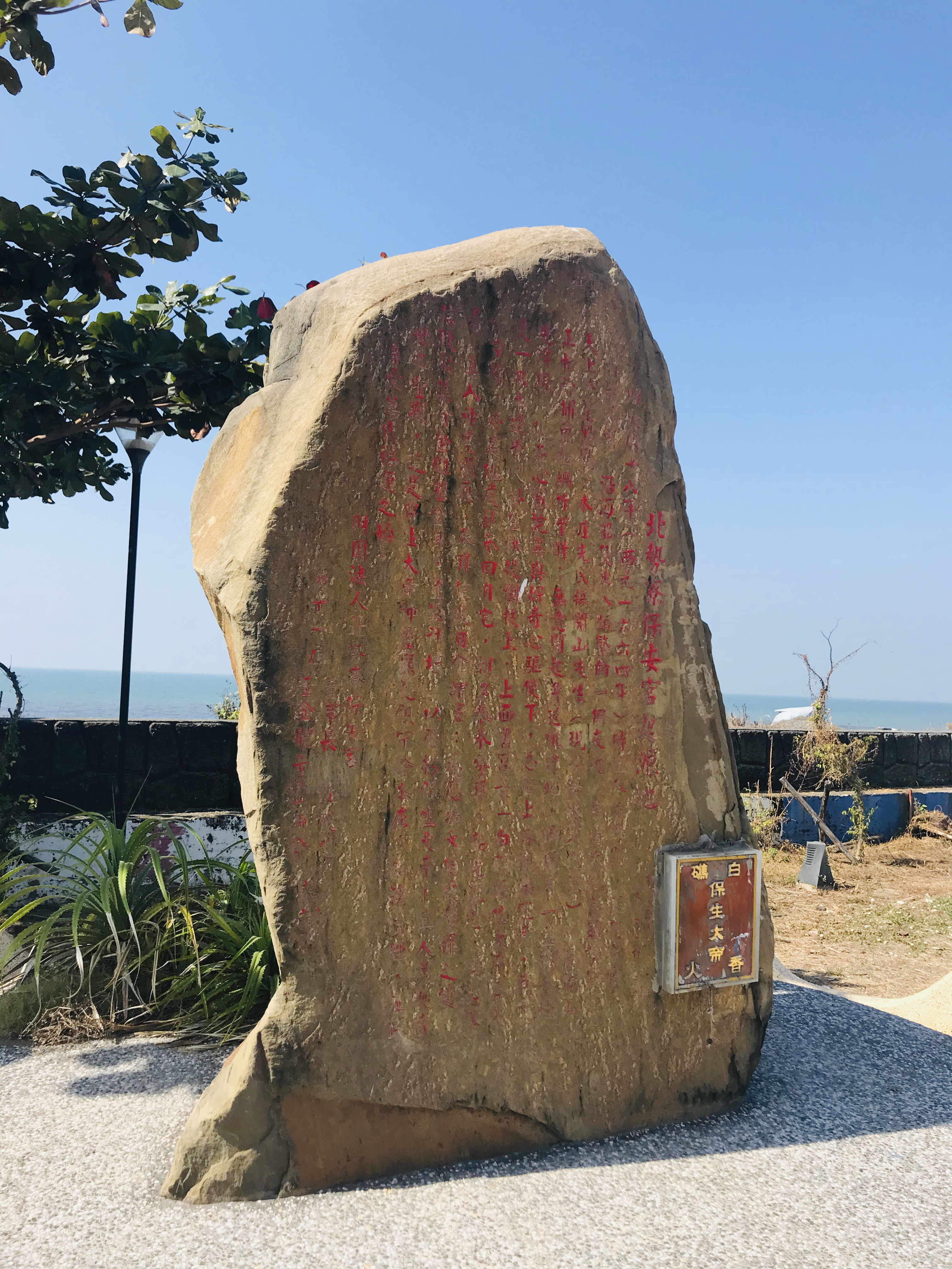 北勢寮保安宮起源地碑照